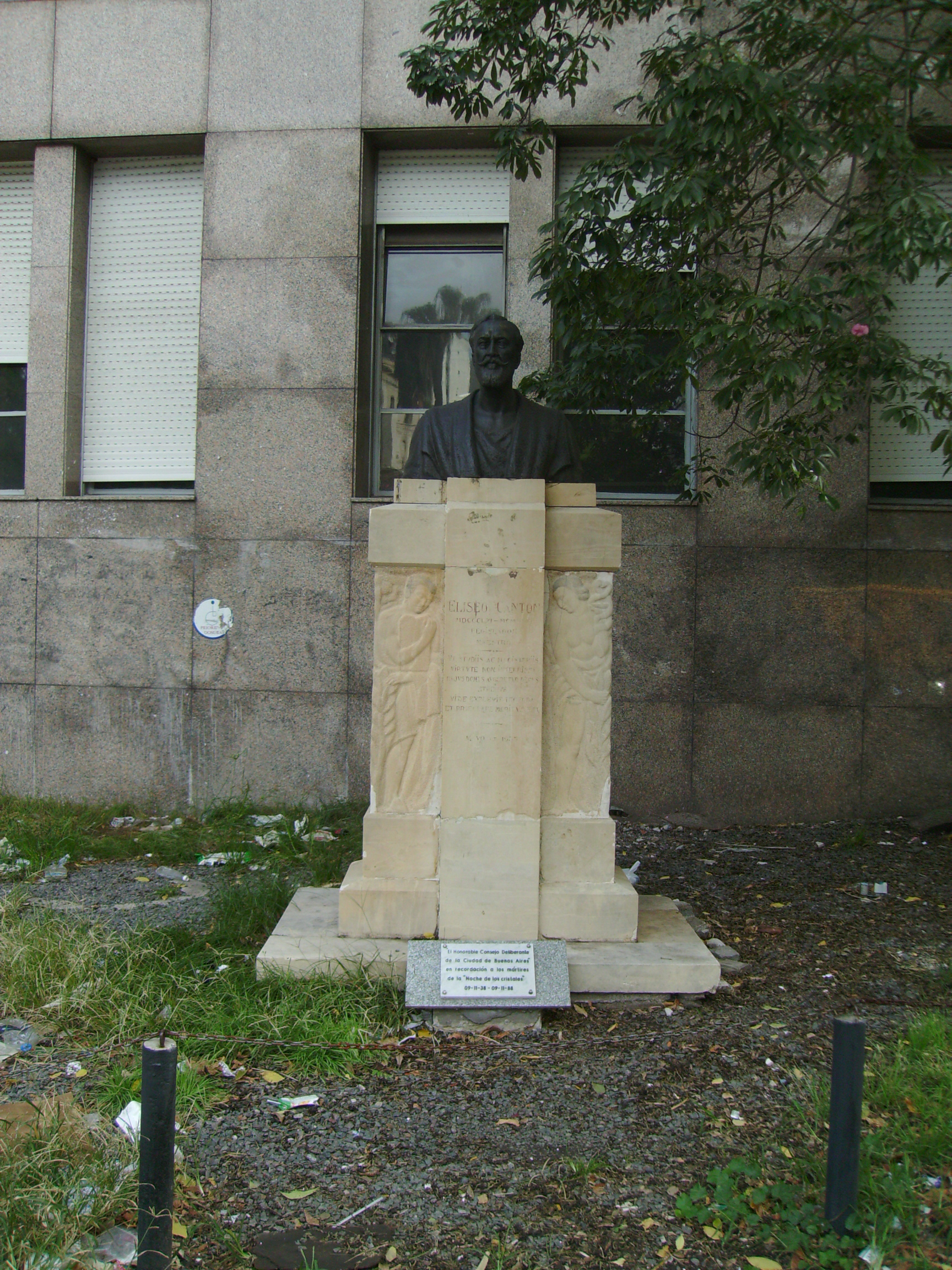 Busto de Eliseo Cantón frente a la plaza Houssay, en Recoleta, Buenos Aires, Argentina.